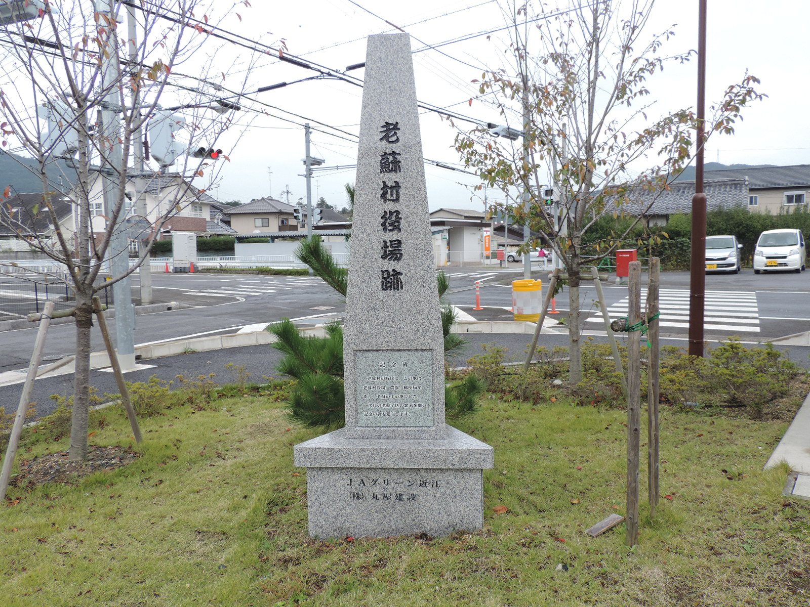 老蘇村役場跡。2017年撮影。